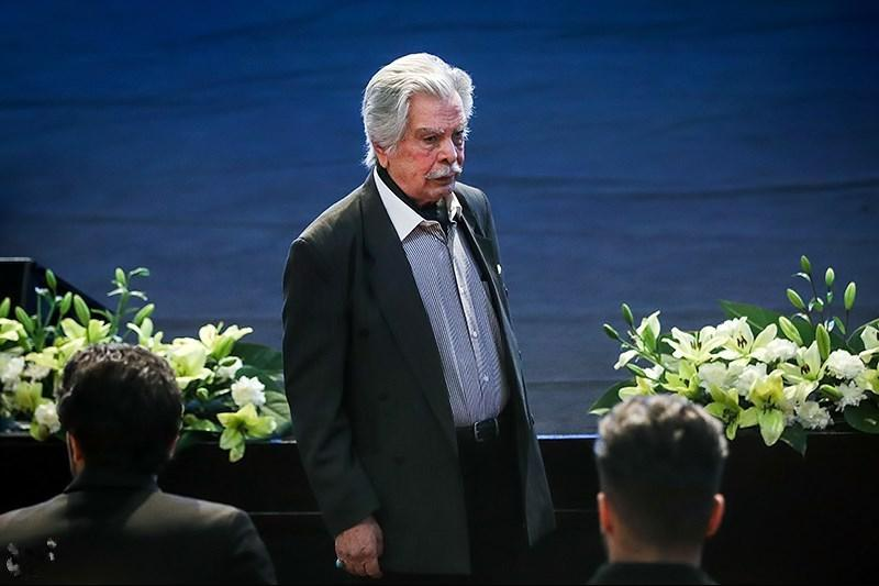 افتتاحیه سی‌وششمین جشنواره فیلم فجر - مراسم افتتاحیه سی‌وششمین جشنواره فیلم فجر شامگاه پنج‌شنبه ۱۲ بهمن ماه با حضور سیدعباس صالحی وزیر فرهنگ و ارشاد اسلامی و جمعی از هنرمندان و سینماگران در سالن همایش‌های برج میلاد تهران برگزار شد.